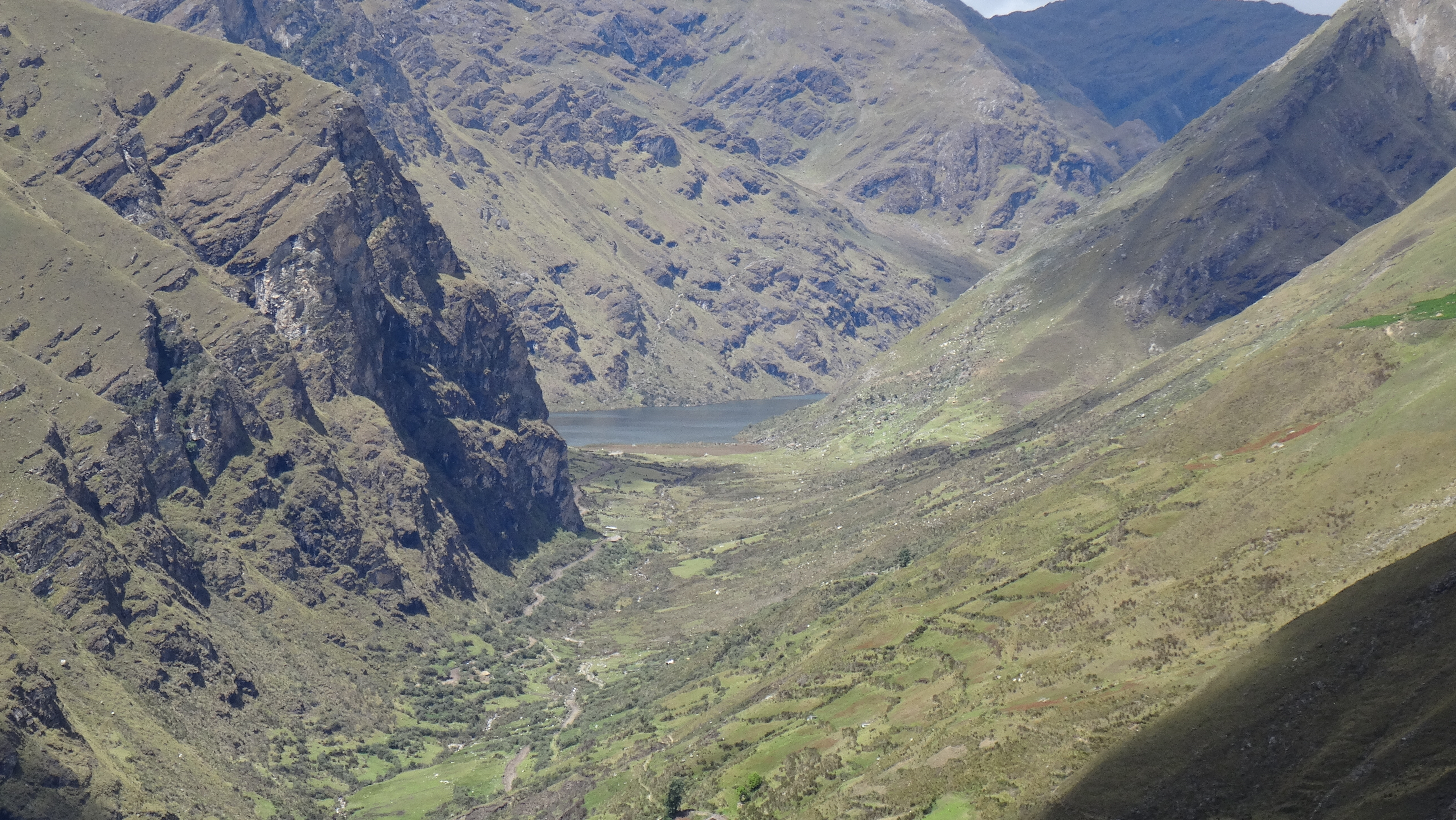 Vista parcial de la laguna Higin desde el cerro Winak. Runa Simi: Hiqin qucha.